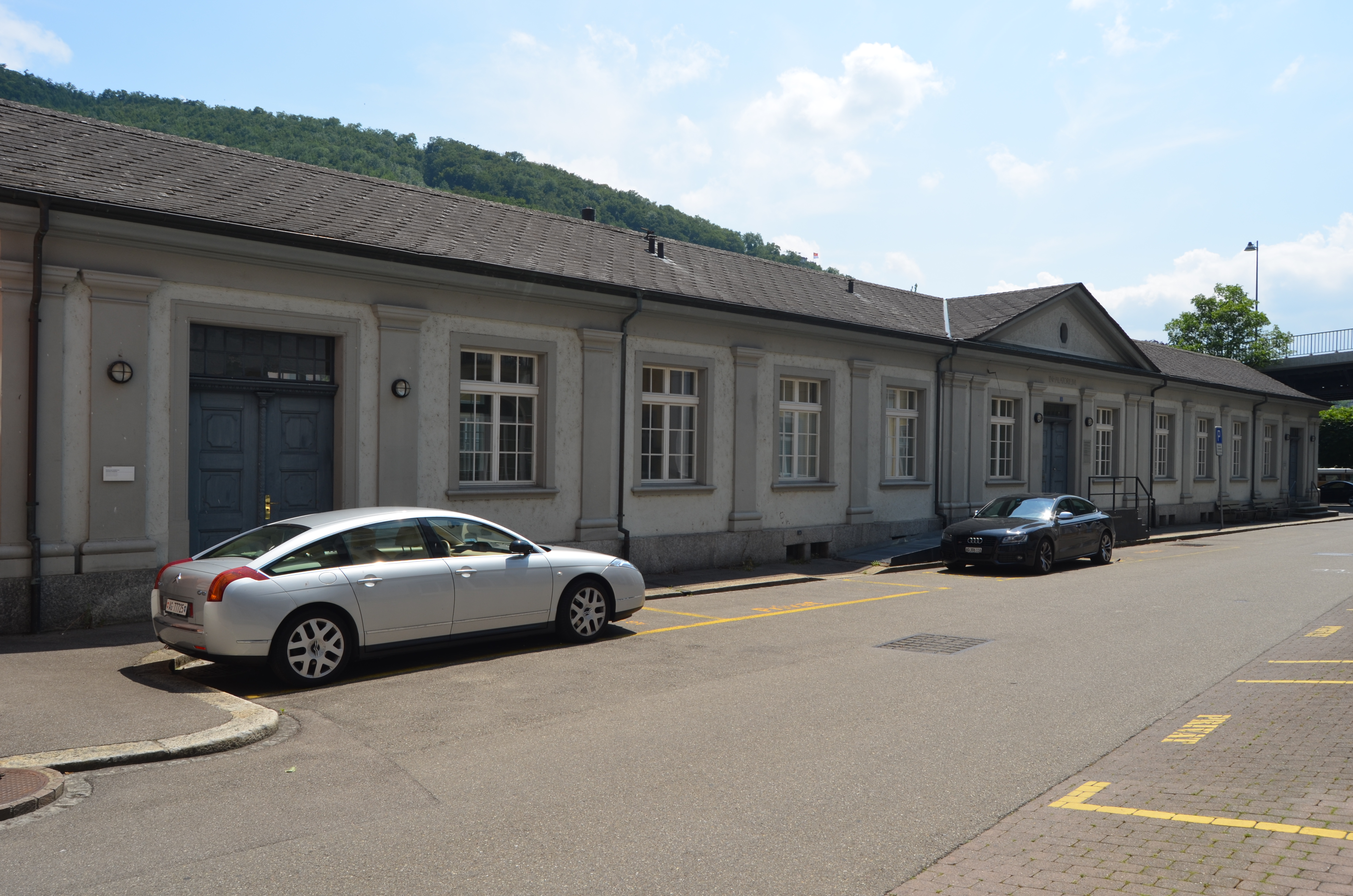 Baden, Staedtisches Inhalatorium - ehemals Trinklaube, Limmatpromenade, Baden. Erbaut um 1910 von Otto Boelsterli. Das Gebaeude entspricht in Ausmass und Gestaltung etwa der 1835/36 an gleicher Stelle nach Plaenen des Basler Architekten Johann Jakob Heimlicher erbauten Trinklaube.